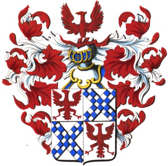 Armoiries de la famille d'Arents de Beerteghem